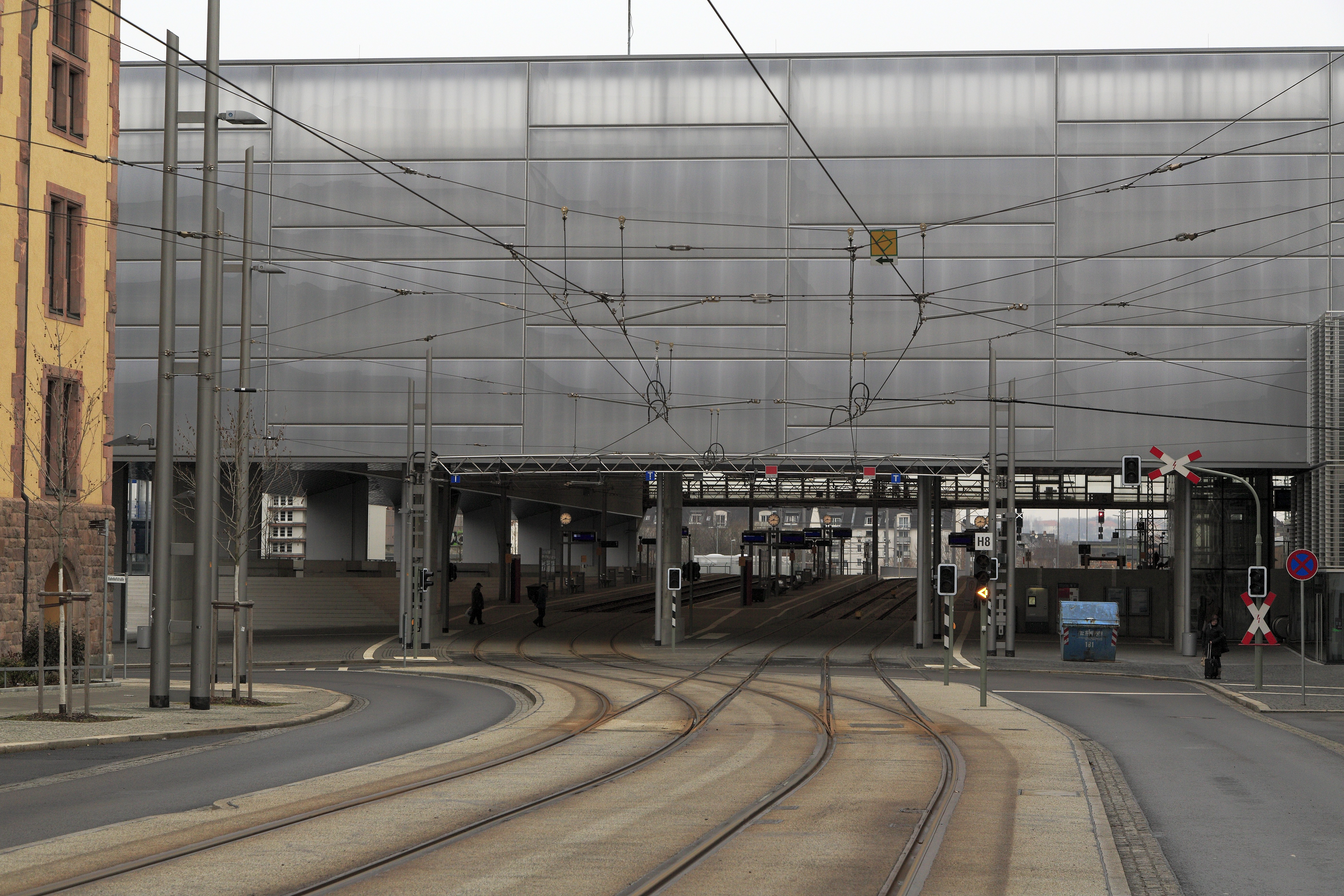 von der Bahnhofstraße, vor der Halle liegen die Verteilerweichen. Die beiden linken Gleise bilden die Straßenbahnwendeschleife, die beiden rechten die Anfang 2015 noch nicht benutzten Übergangsgleise ins Fernbahnnetz.